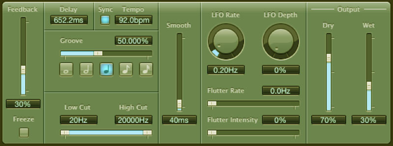 En bild på funktioner i effekten Delay